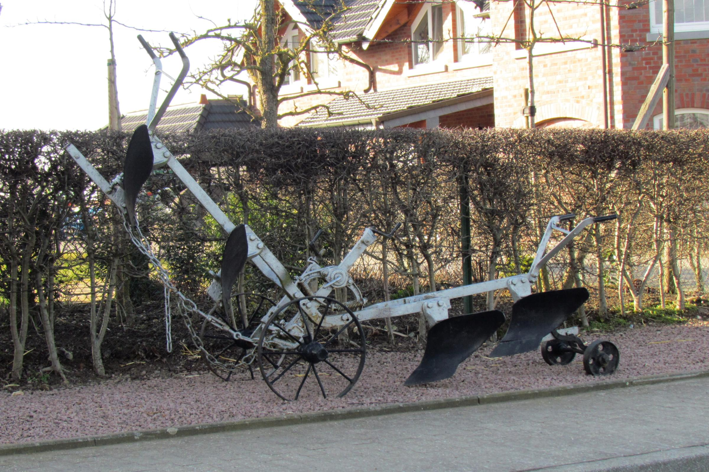 Erinnerung an alte Zeiten in Vinteln